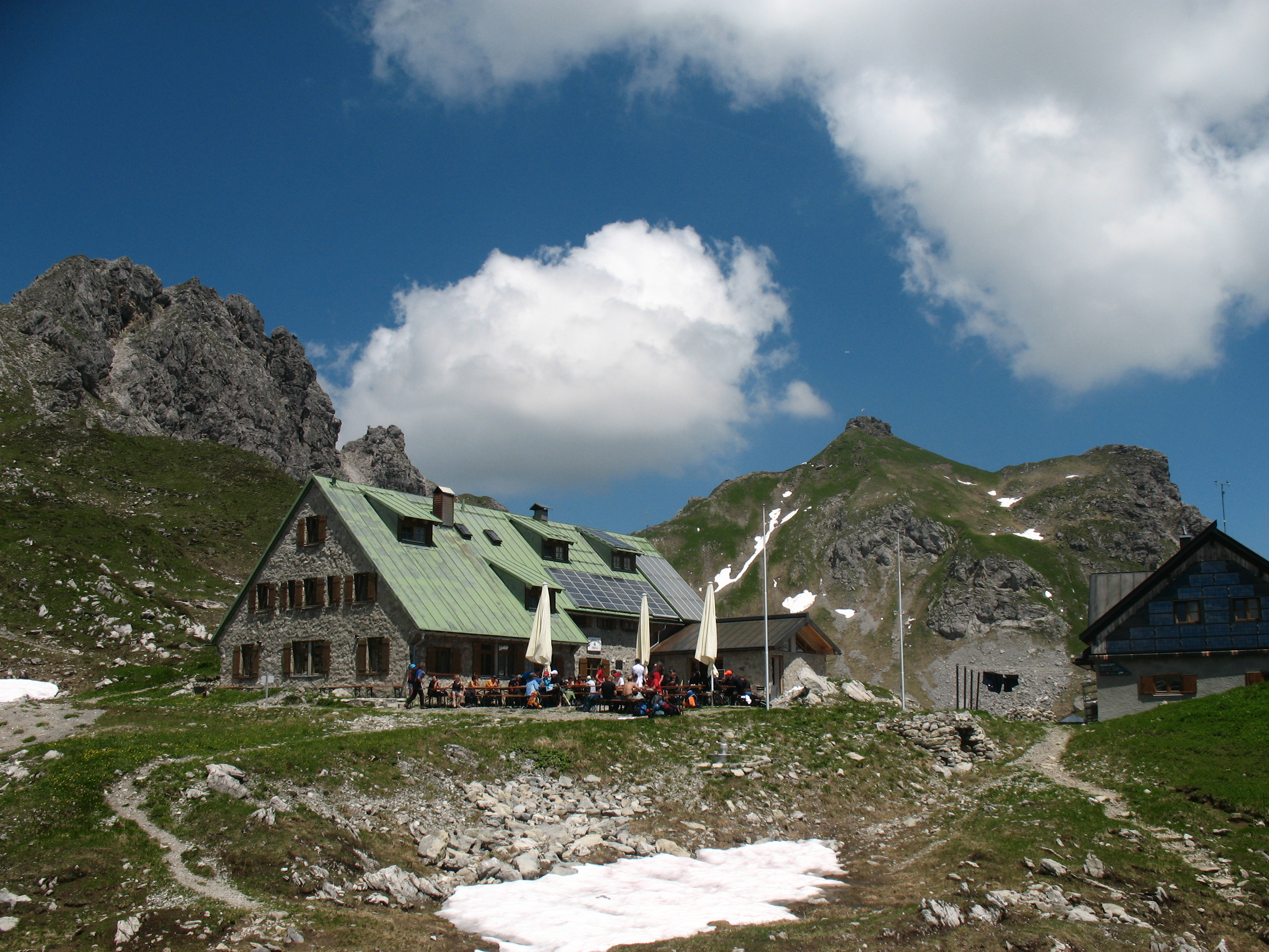 Mindelheimer Hütte (2013 m) und Kemptner Kopf (2191 m).